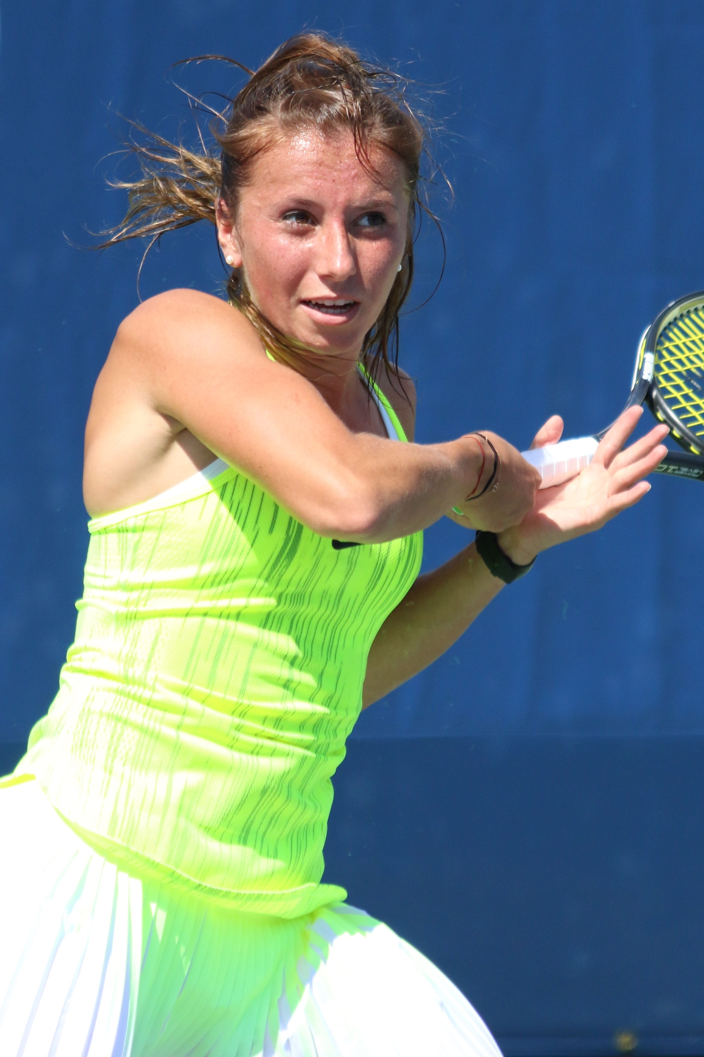 Beck US16 (18)